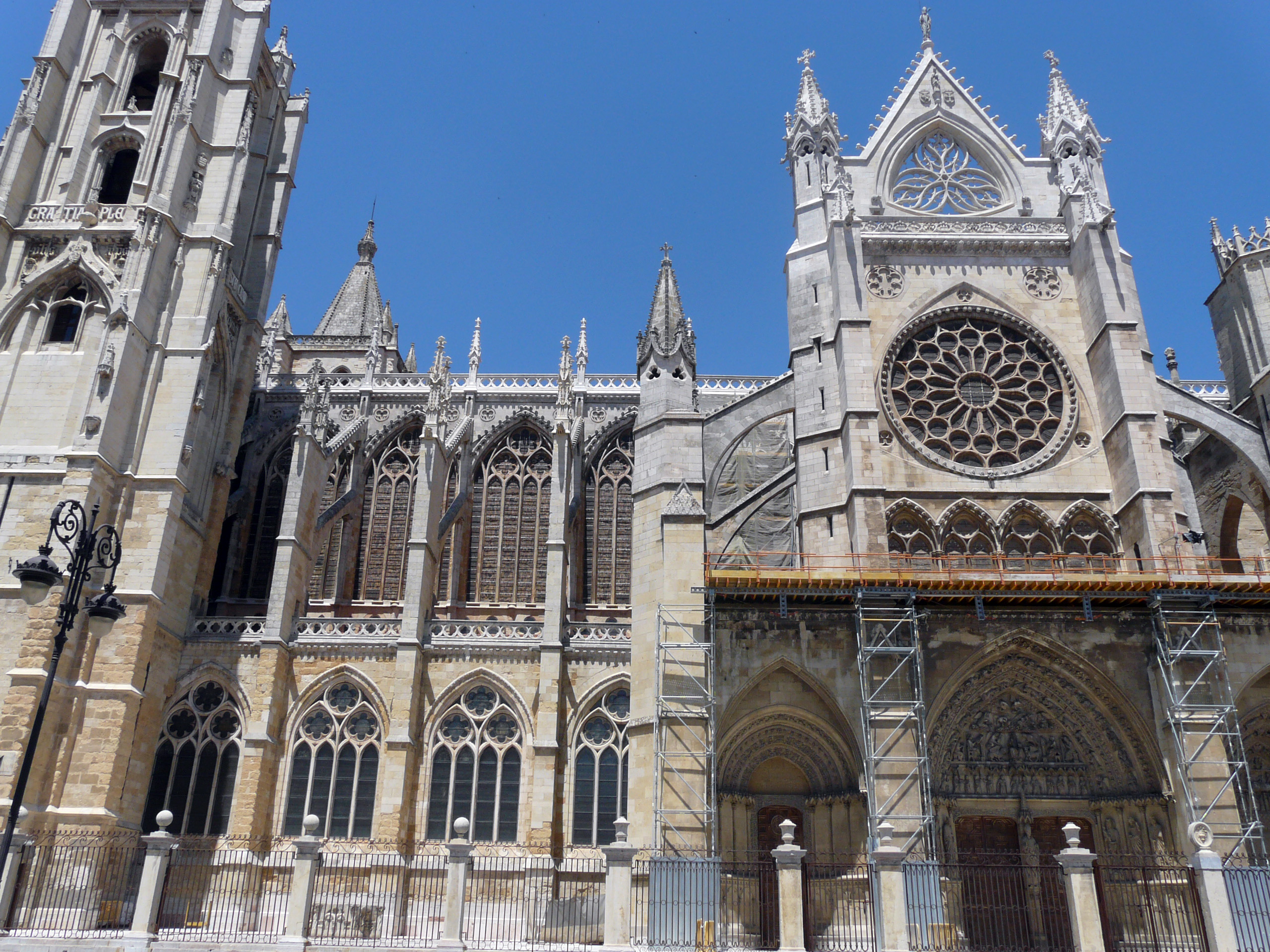 Fachada Sur, Catedral de León